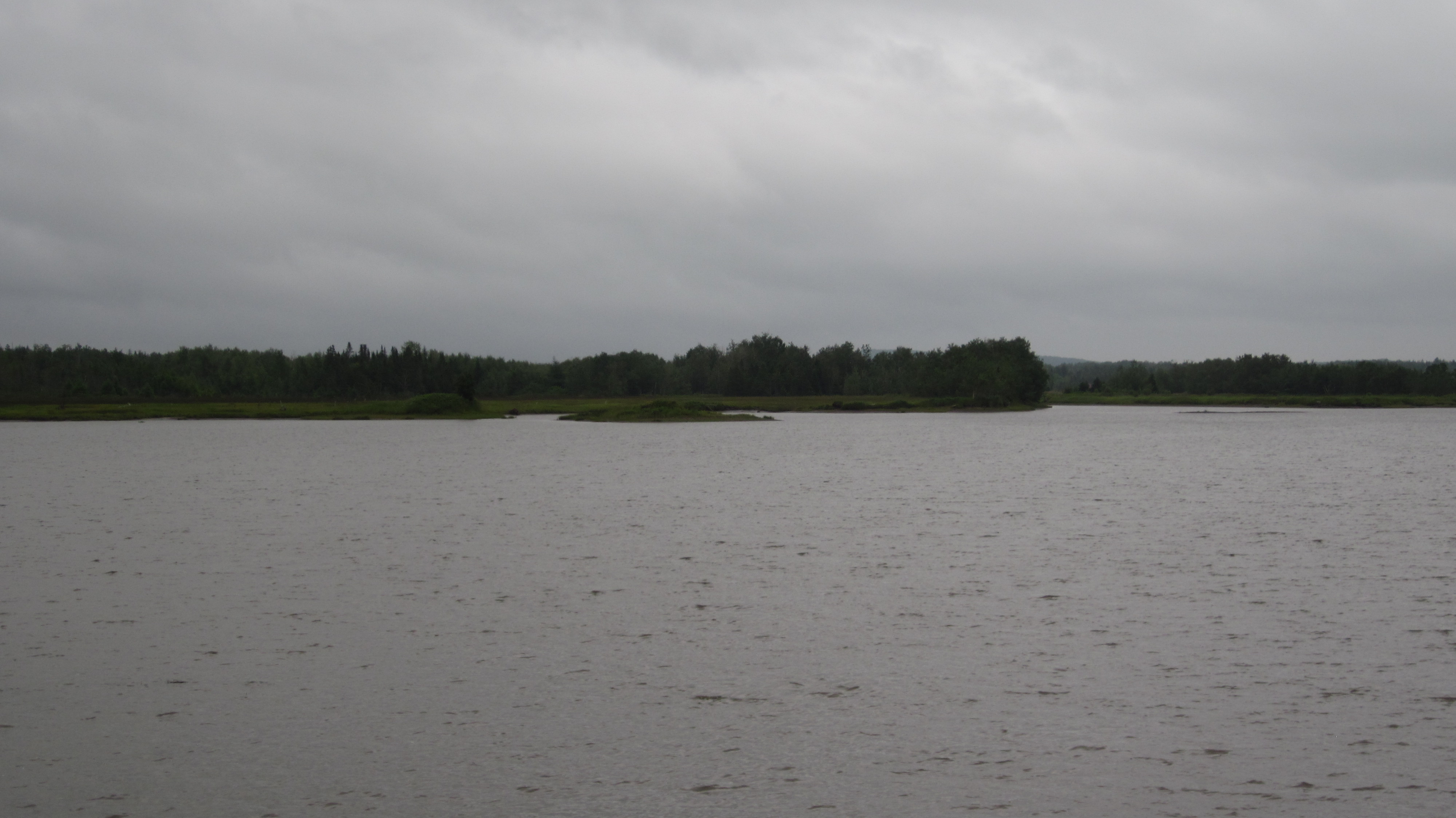 Barachois de Bonaventure, vu du village